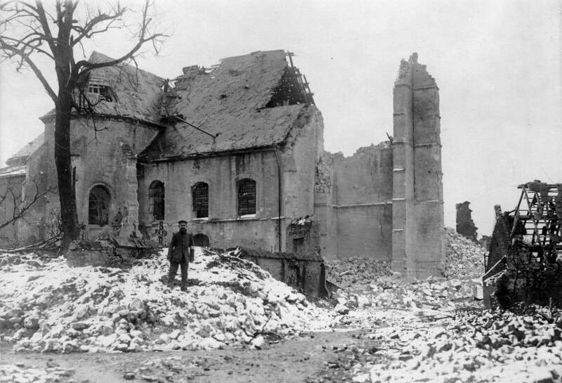 Die verlorene Tankschlacht der Engländer bei Cambrai. Im wiedereroberten Fontaine. Die durch engl. Granatfeuer völlig zerstörte Kirche von Fontaine. Filmtrupp 7 6318 BUFA Information added by Wikimedia users.